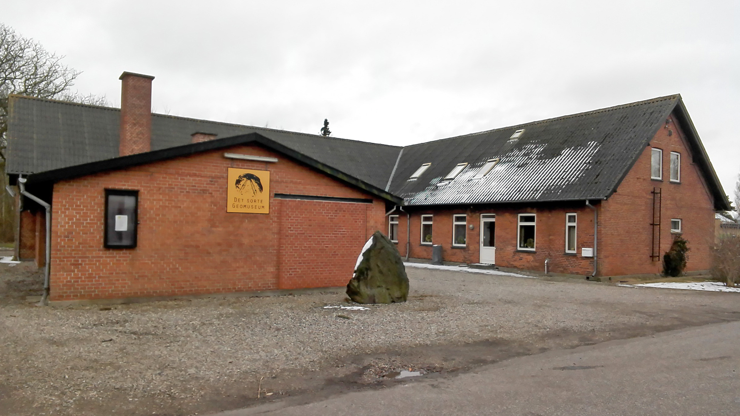 Det sorte Geomuseum i Gedser